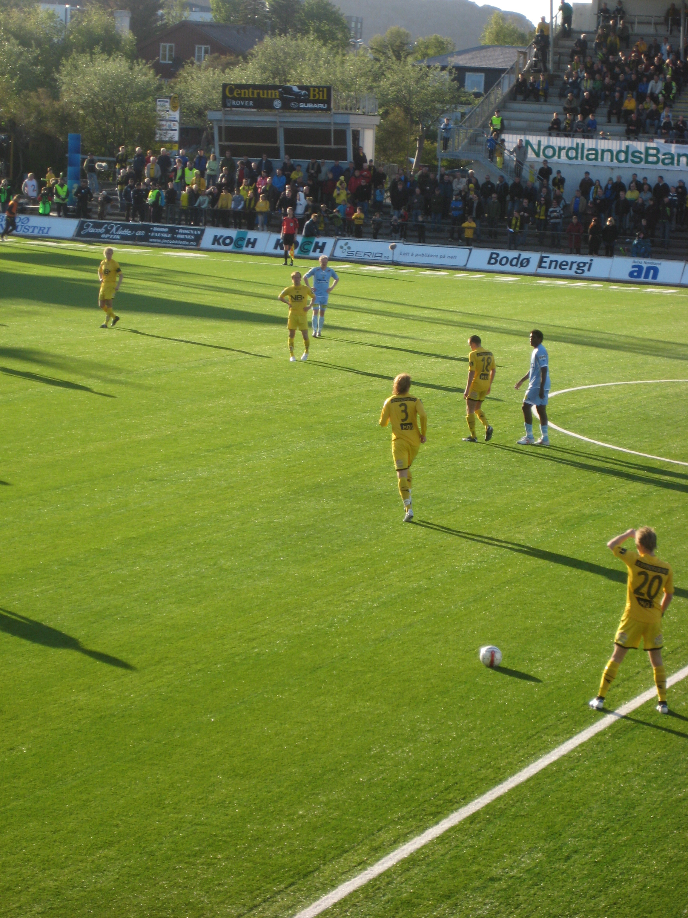 Spilere fra nederst i bildet: Bodø/Glimt: Trond Olsen (20) Per Verner Vågan Rønning (3) Runar Berg (7) Jan Derek Sørensen (10) Lillestrøm SK Olivier Occean (30) Ukjent